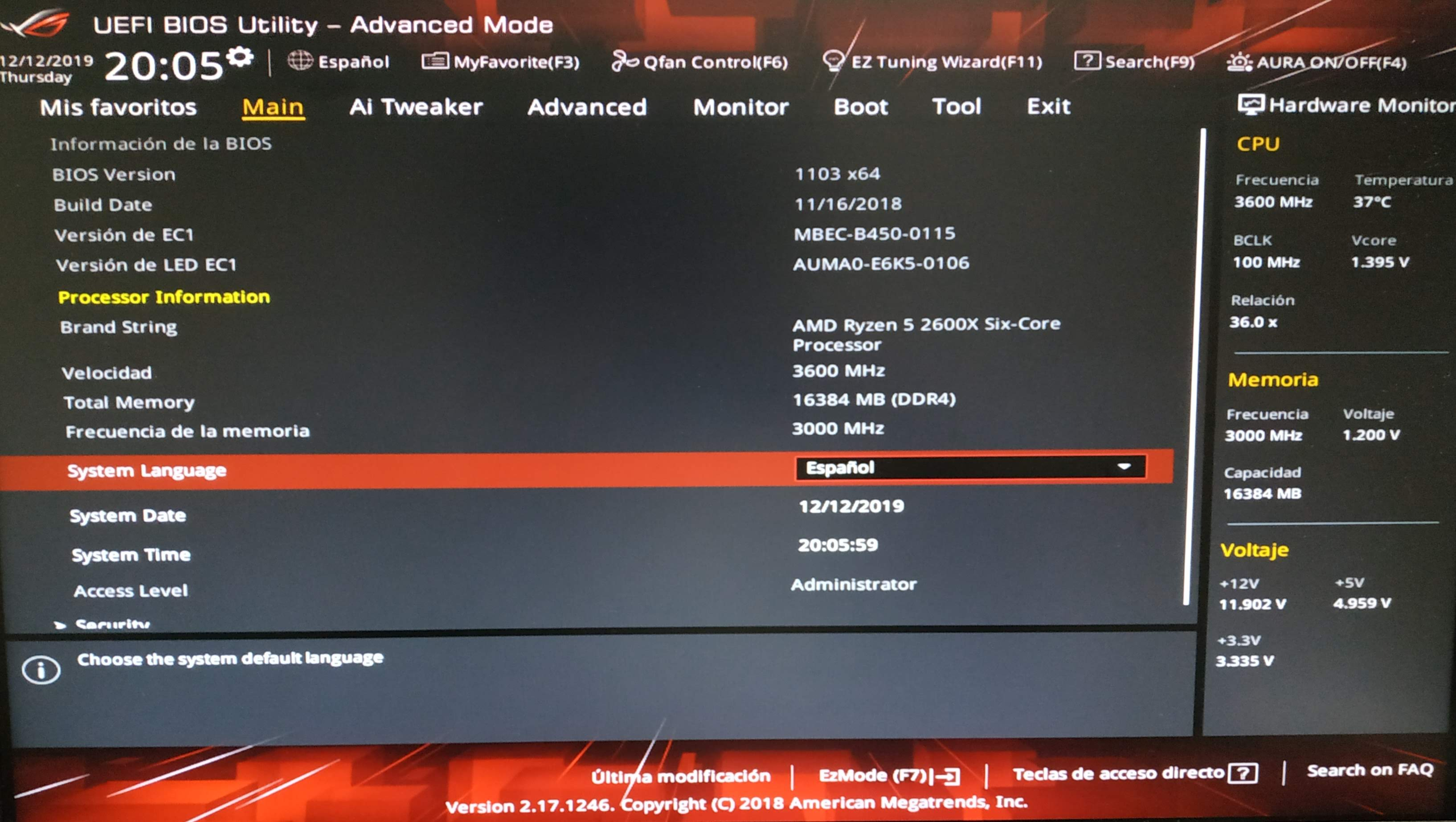 Asus txarte nagusien bios-a